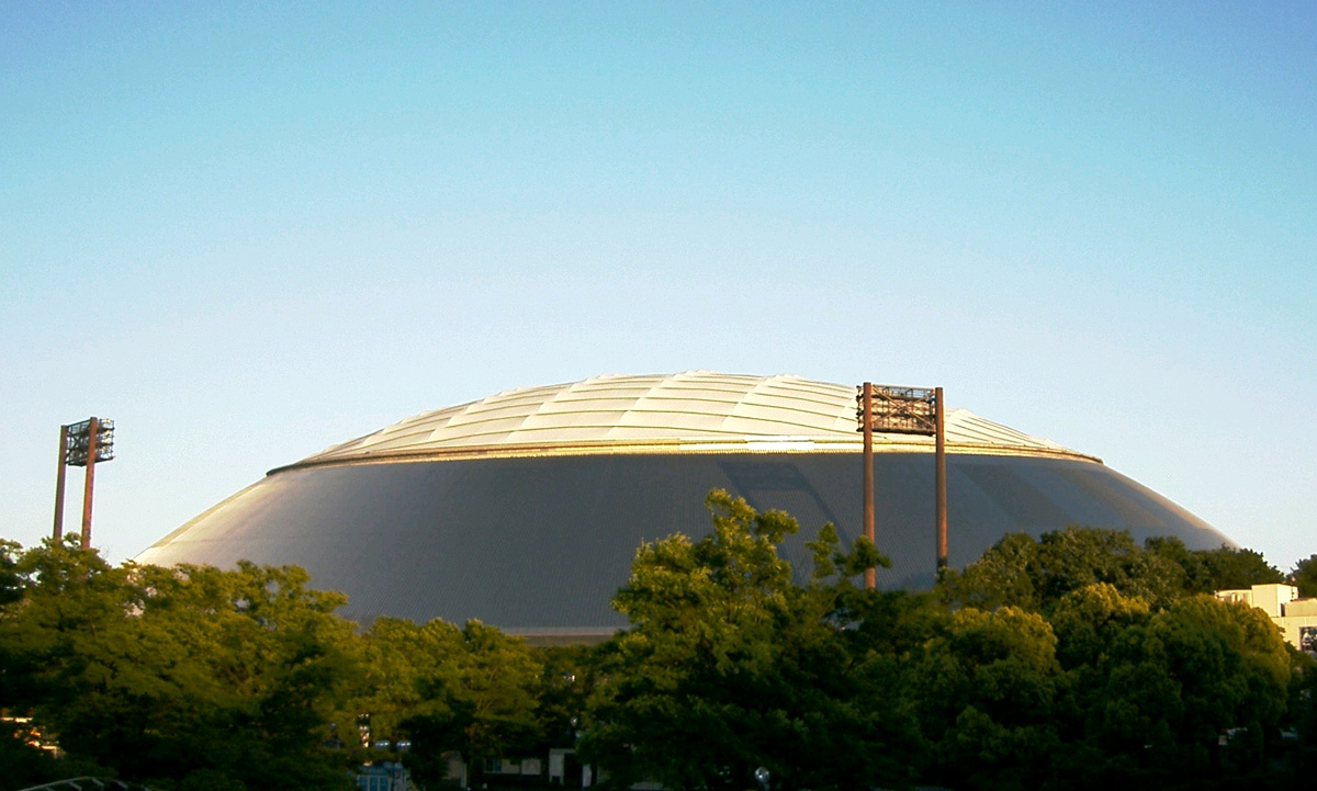 “Seibu Dome” Seibu Lions professional baseball team located in Tokorozawa, Saitama, Japan. “西武ドーム” 日本の埼玉県所沢市にあるドーム式野球場。日本のプロ野球パリーグに加盟する、西武ライオンズのホーム球場でもある。